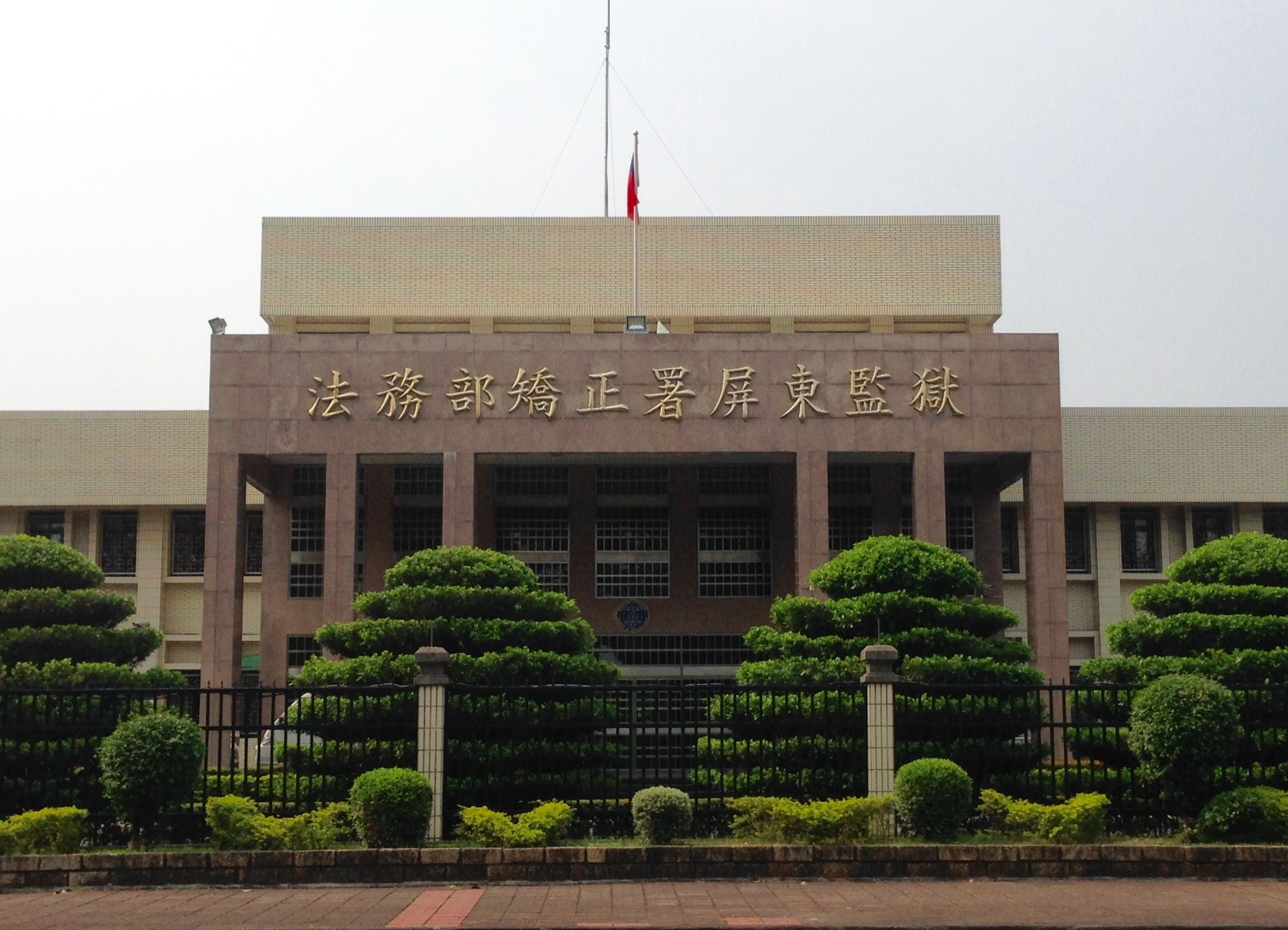 中文（台灣）: 法務部矯正署屏東監獄